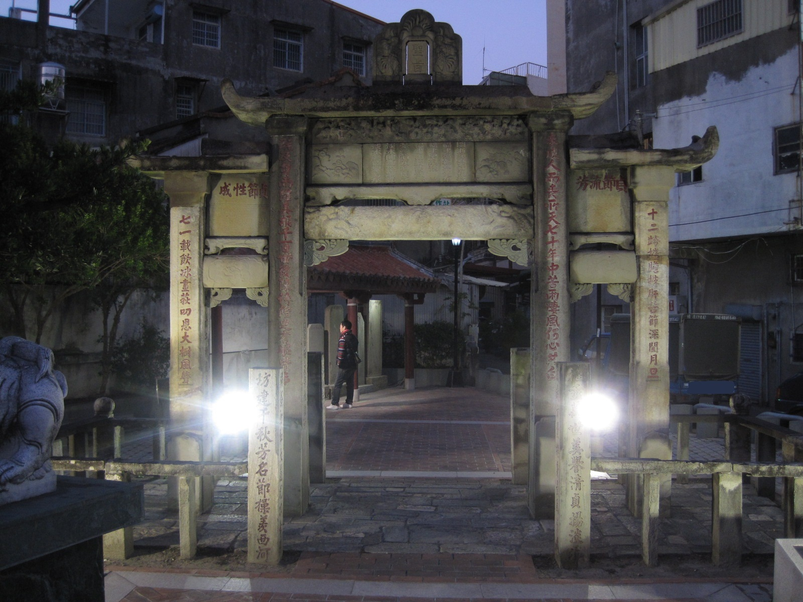 中文（台灣）: 夜晚所拍攝的大甲林氏貞孝坊。